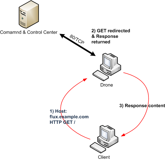 Bildliche darstellung eines fast-Flux Netzwerkes